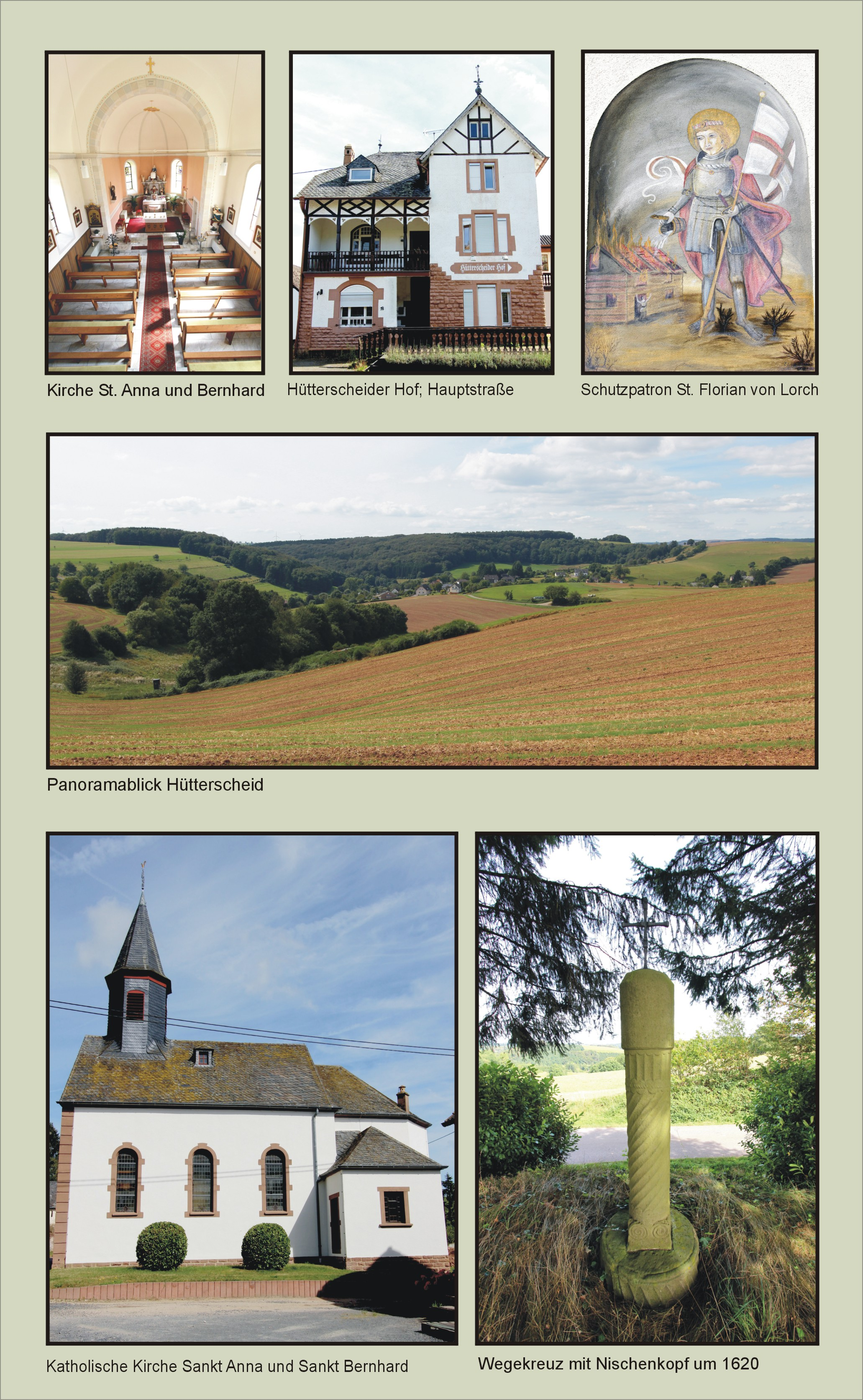 54636 Hütterscheid in der Eifel. Sehenswürdigkeiten. Aufnahme von 2016.